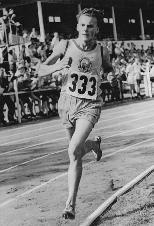 Siegfried Herrmann ADN-Zentralbild TBD 5.7.1952 3. Leichtathletik-Meisterschaften der Deutschen Demokratischen Republik vom 2. bis 6.7.1952 im Ernst-Abbe-Sportfeld, Jena. Siegfried Hermann, Sportvereinigung Traktor, lief einen neuen DDR-Rekord 1952 im 1500 m Lauf mit 3:57,0 Min. - A115 - 6324-18 Leihweise ZentralBild